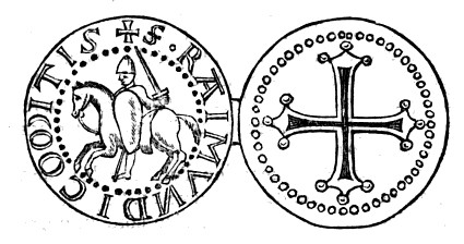 Raymond IV of Toulouse